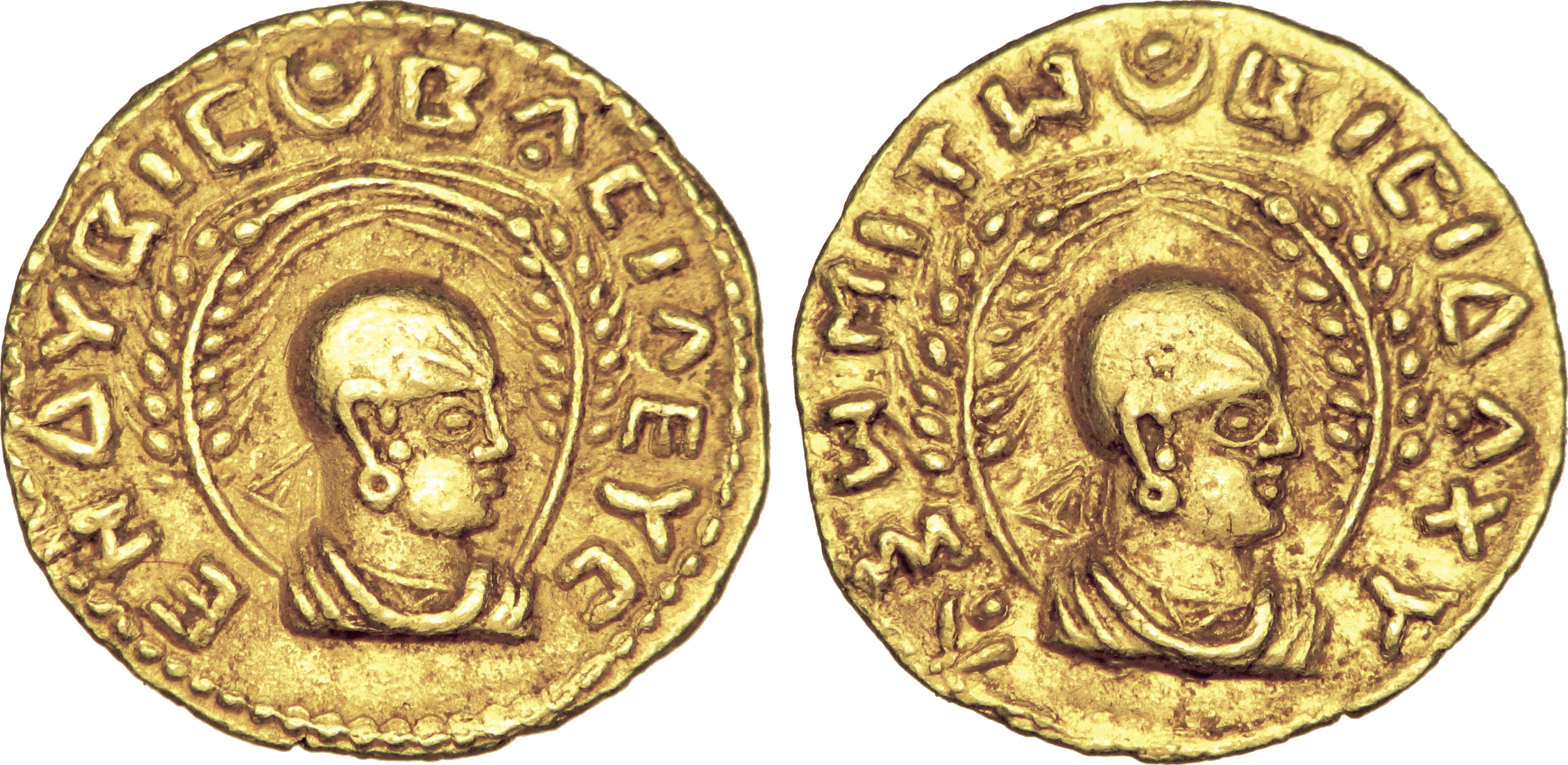 Nom de l'atelier : Axoum, atelier indéterminé Métal : or Diamètre : 15,6mm Axe des coins : 12h. Poids : 2,72g Description avers : Buste drapé à droite, la chevelure recouverte d'un bonnet décoré sur sa partie avant ; l'ensemble entre deux épis de blé partant des épaules ; légende autour avec un croissant pointé à 12 heures ; grènetis. Légende avers : ENDUBIS - BASILEUS Traduction avers : (d’Endubis roi). Description revers : Buste drapé à droite, la chevelure recouverte d'un bonnet décoré sur sa partie avant ; l'ensemble entre deux épis de blé partant des épaules ; légende autour avec un croissant pointé à 12 heures ; grènetis. Légende revers : AXwMITw BISIDACU Traduction revers : (des Axoumites de Dakhu).